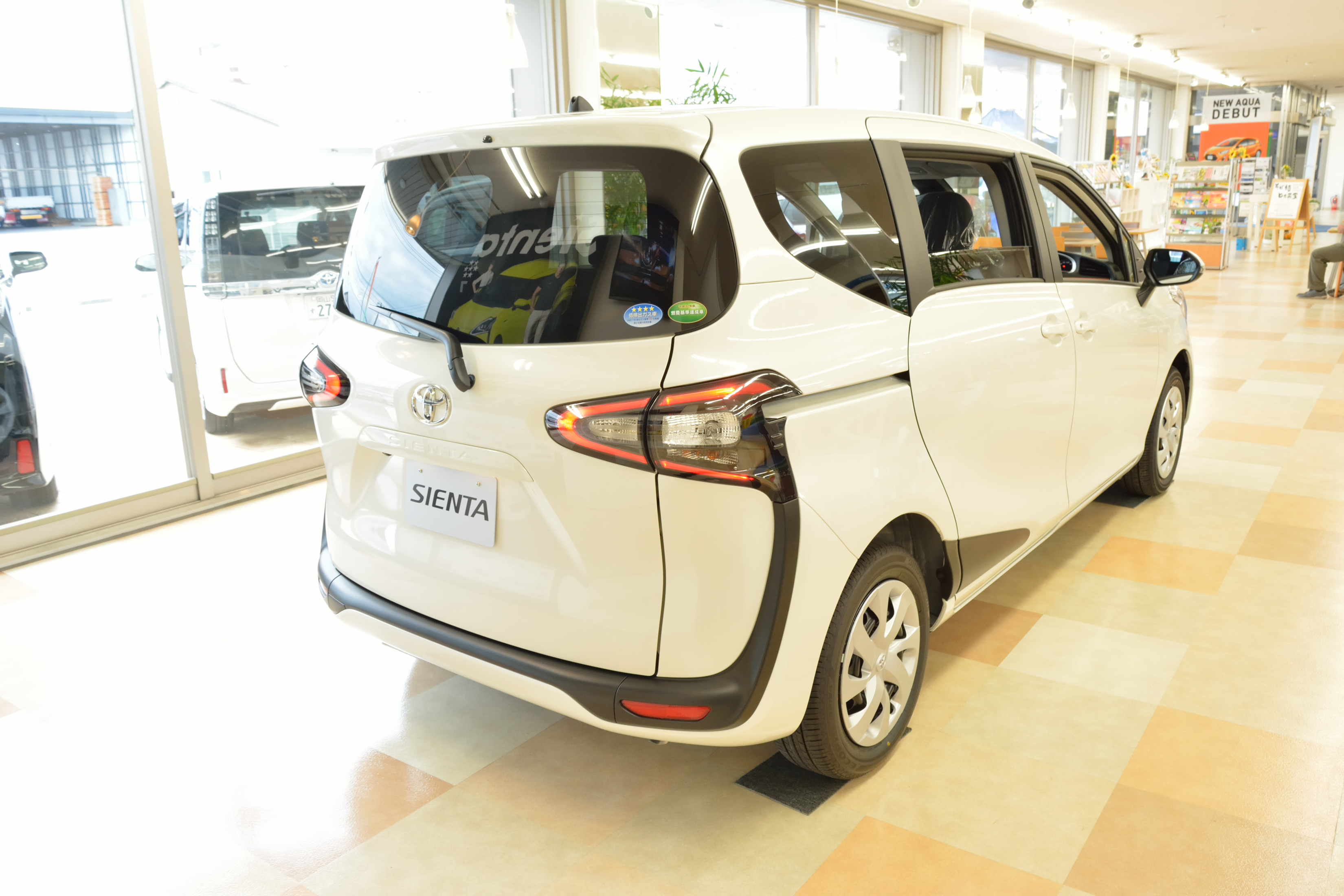 少し、広角目に右斜めから撮影しています。